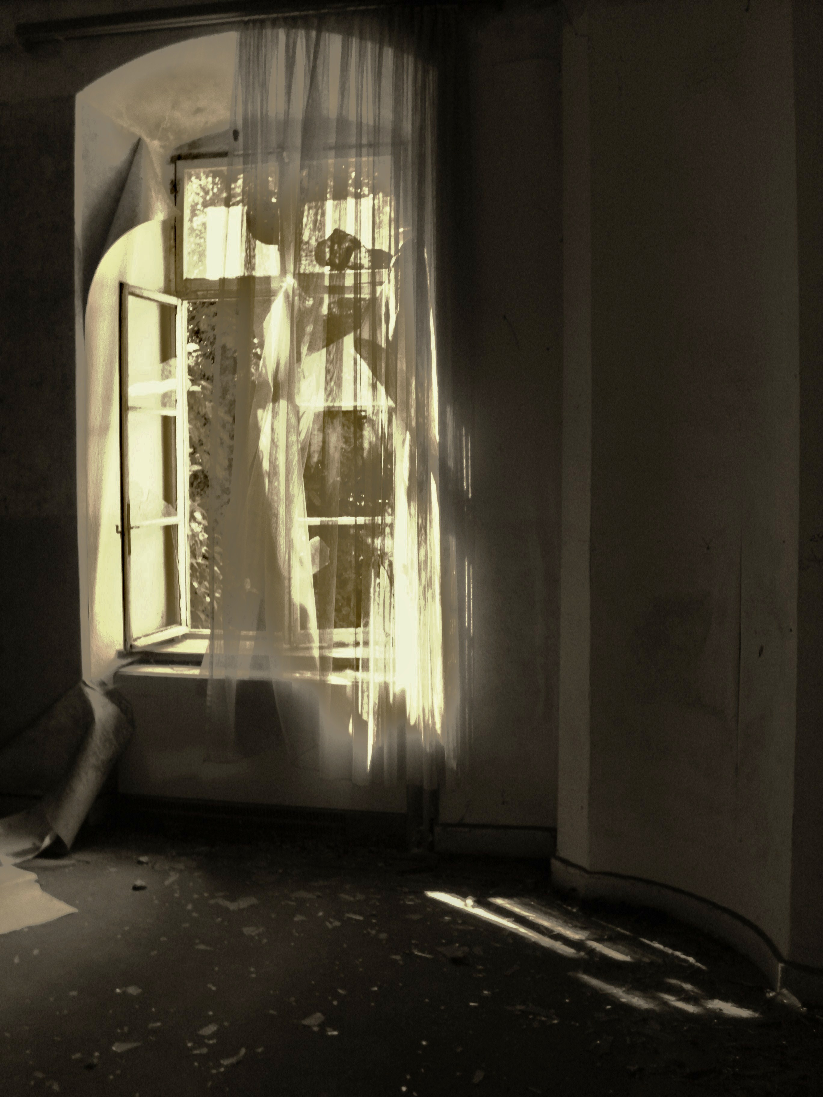 LostPlaceBoppard